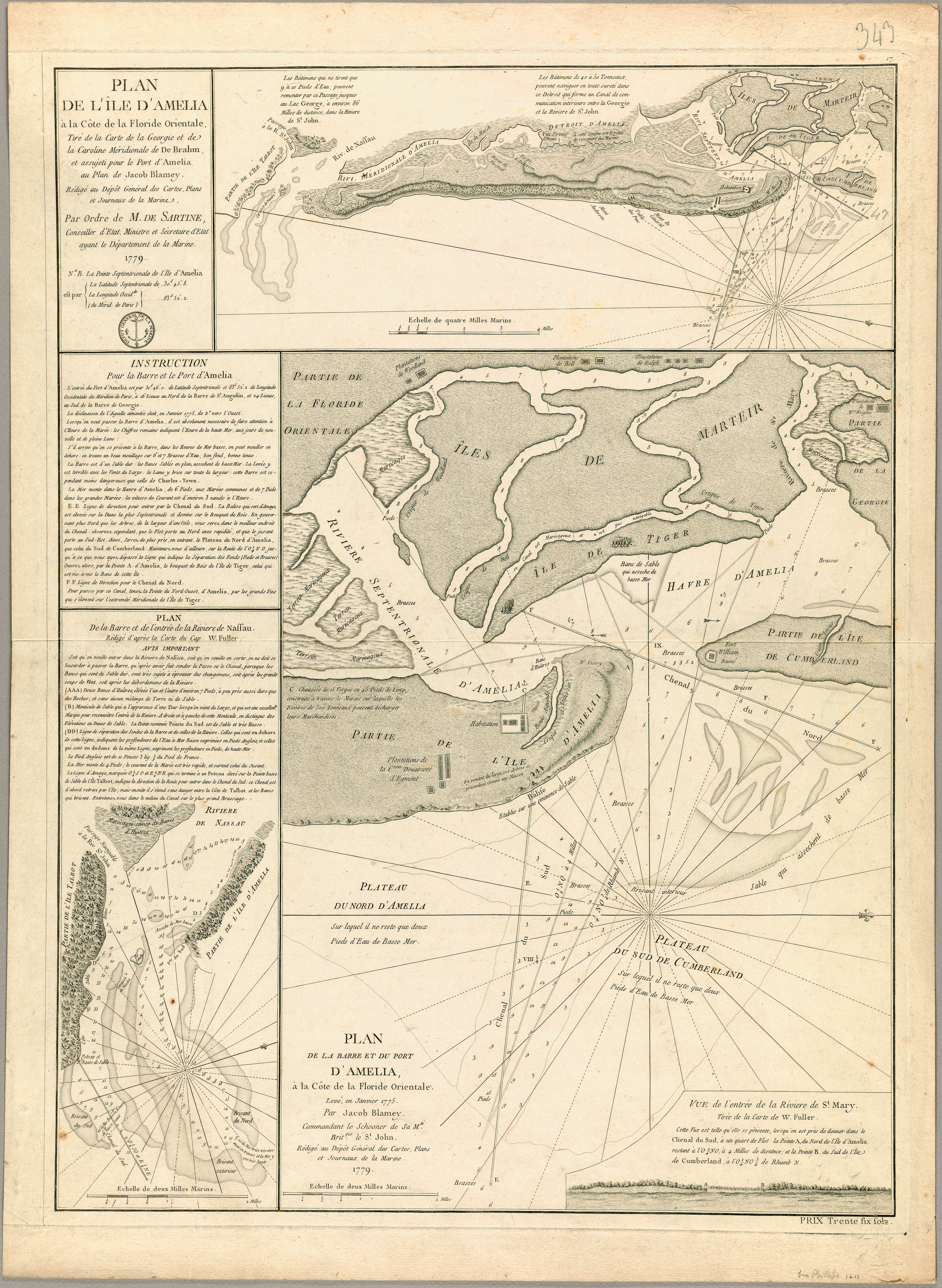 Plan de l'île d'Amelia à la côte de la Floride orientale. Tiré de la carte de la Georgie et de la Caroline méridionale de De Brahm et assujeti pour le Port d'Amelia au plan de Jacob Blamey / Rédigé au Depôt Général des Cartes, Plans et Journaux de la Marine par ordre de M. de Sartine, Conseiller d'Etat, Ministre et Sécretaire d'Etat ayant le Département de la Marine. 1779